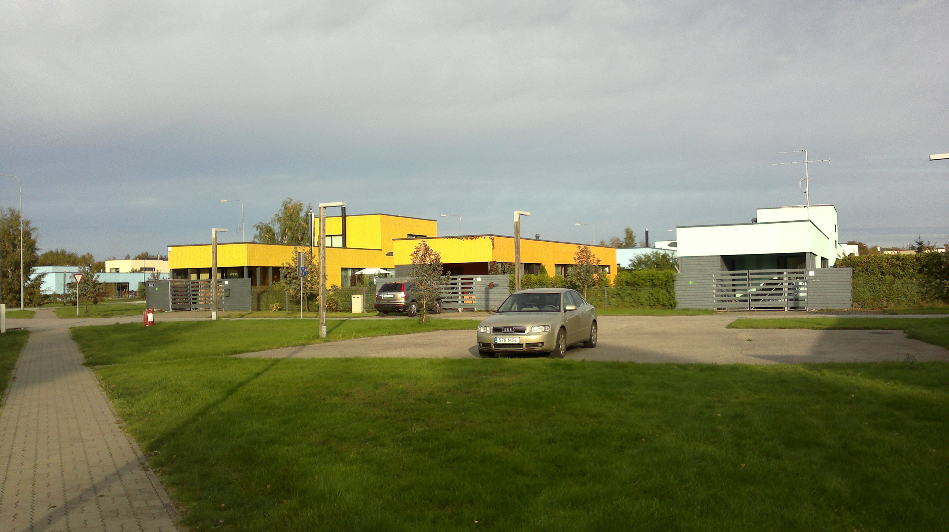 Abara tänav Tallinnas